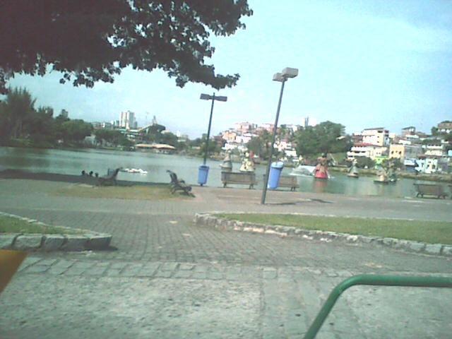 Foto do Dique do Tororó, Salvador, Bahia, Brasil.